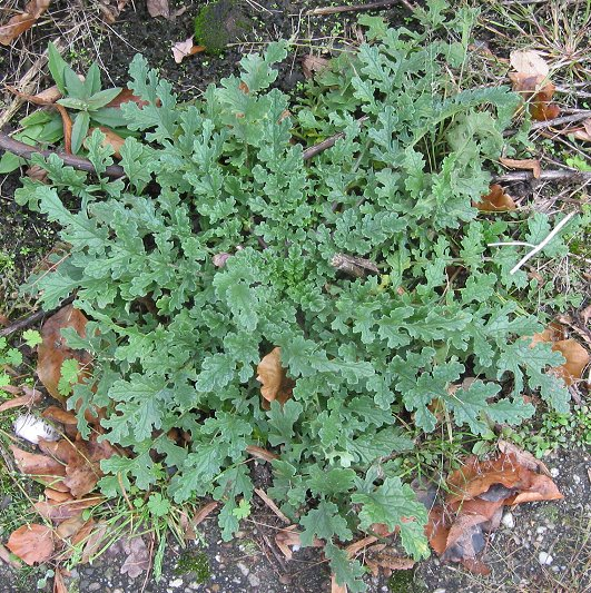 zelfgemaakte foto van Jacobskruiskruid plant; meerjarige plant na de bloei: eind oktober